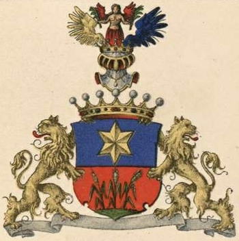 Engelhardti suguvõsa parunivapp